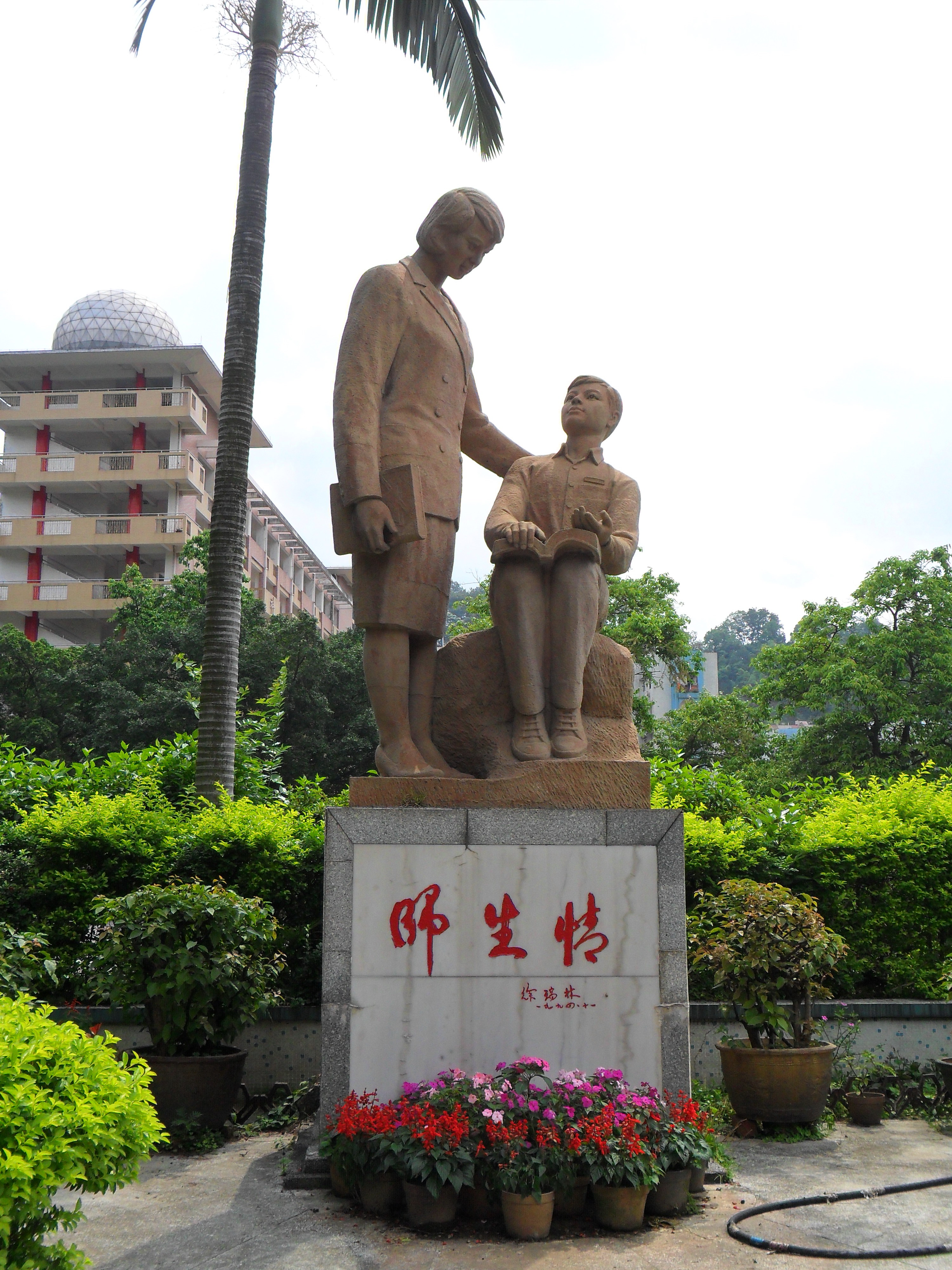 位于梧州一中原址，现已拆毁，在新校区有复制品